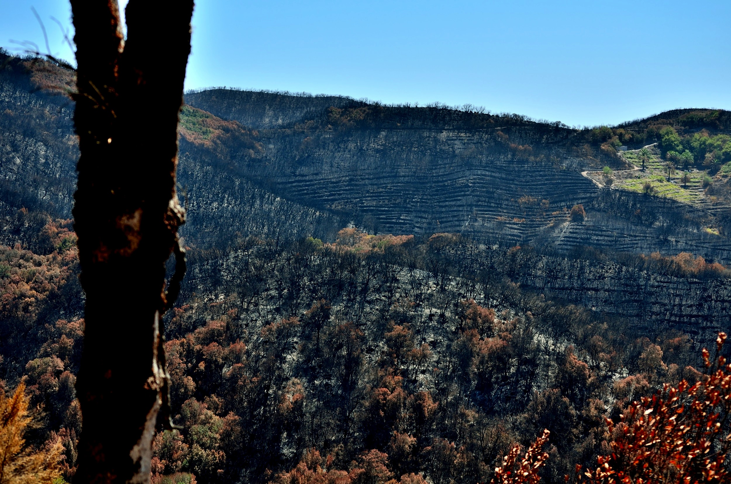 Resultado del incendio de 2012 en el Parque Garajonay de La Gomera. This is a photography of a Special Area of Conservation in Spain with the ID: ES0000044. Natura2000 entry, EEA entry